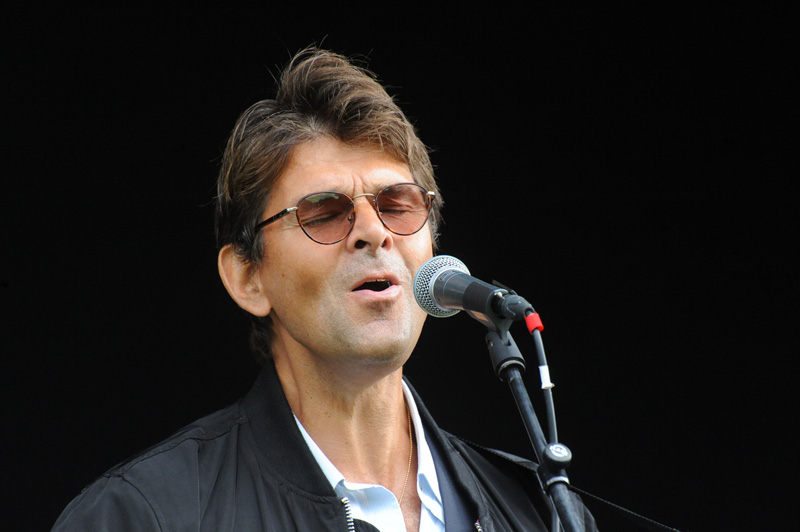 Niklas Strömstedt at the 2013 Stockholm Folk Festival.